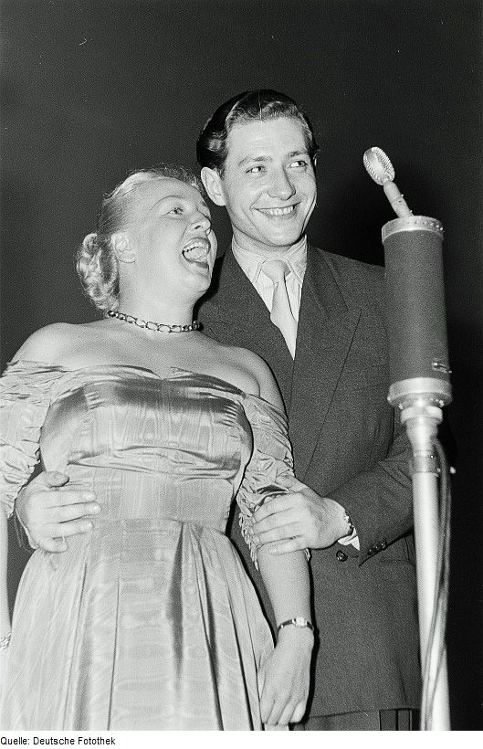 Original image description from the Deutsche FotothekWährend eines Auftrittes